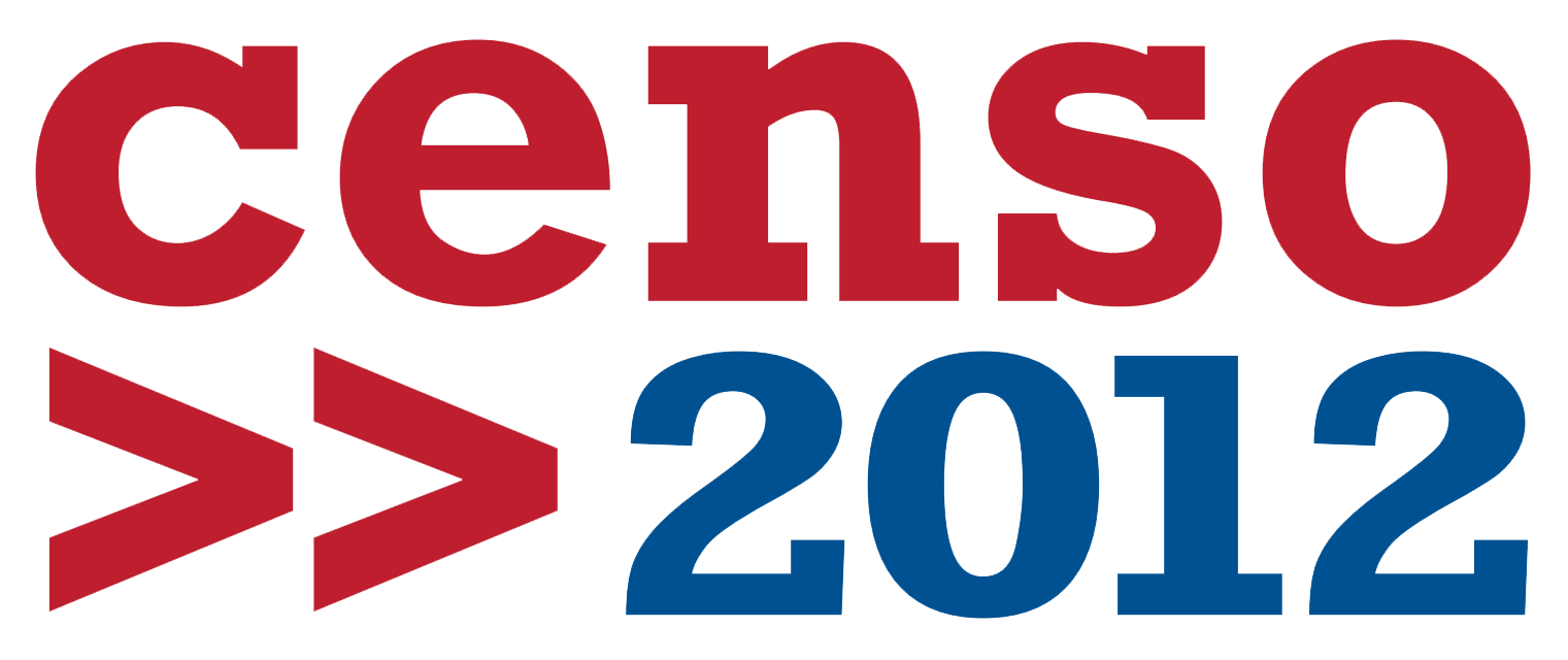 Logotipo del censo chileno de 2012.